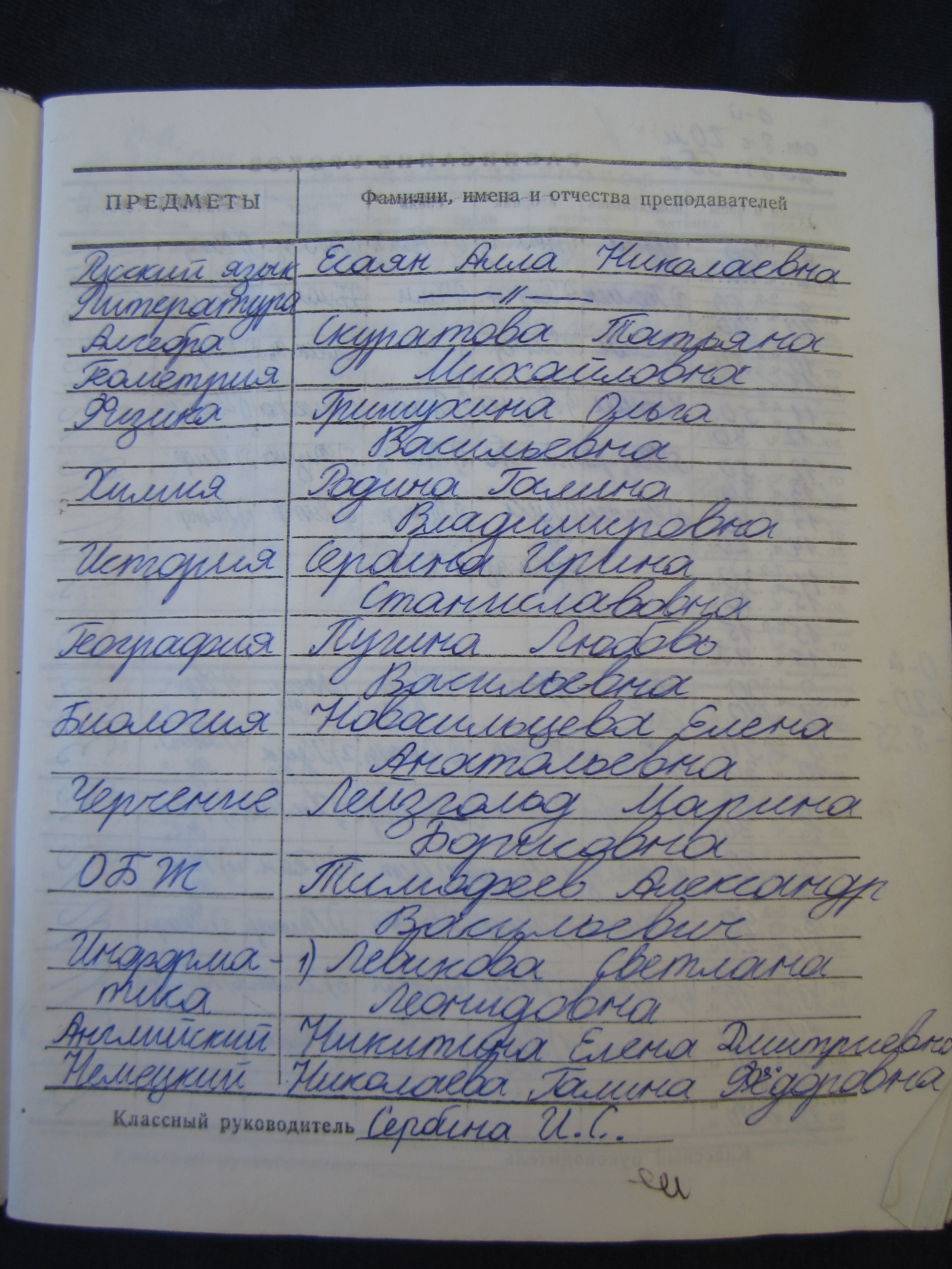 Страница из дневника учащегося вып. 2001 г.